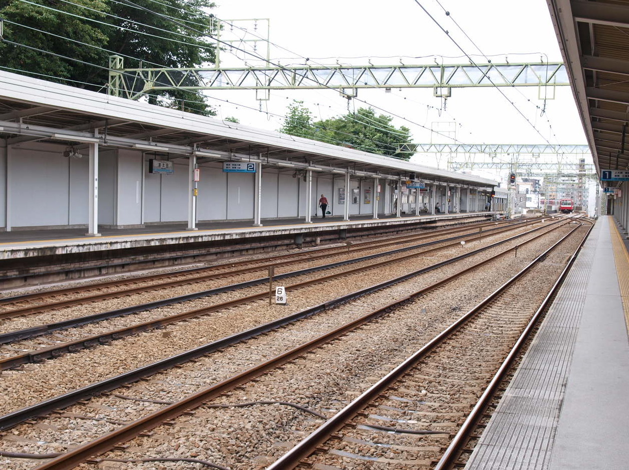 南太田駅プラットホーム